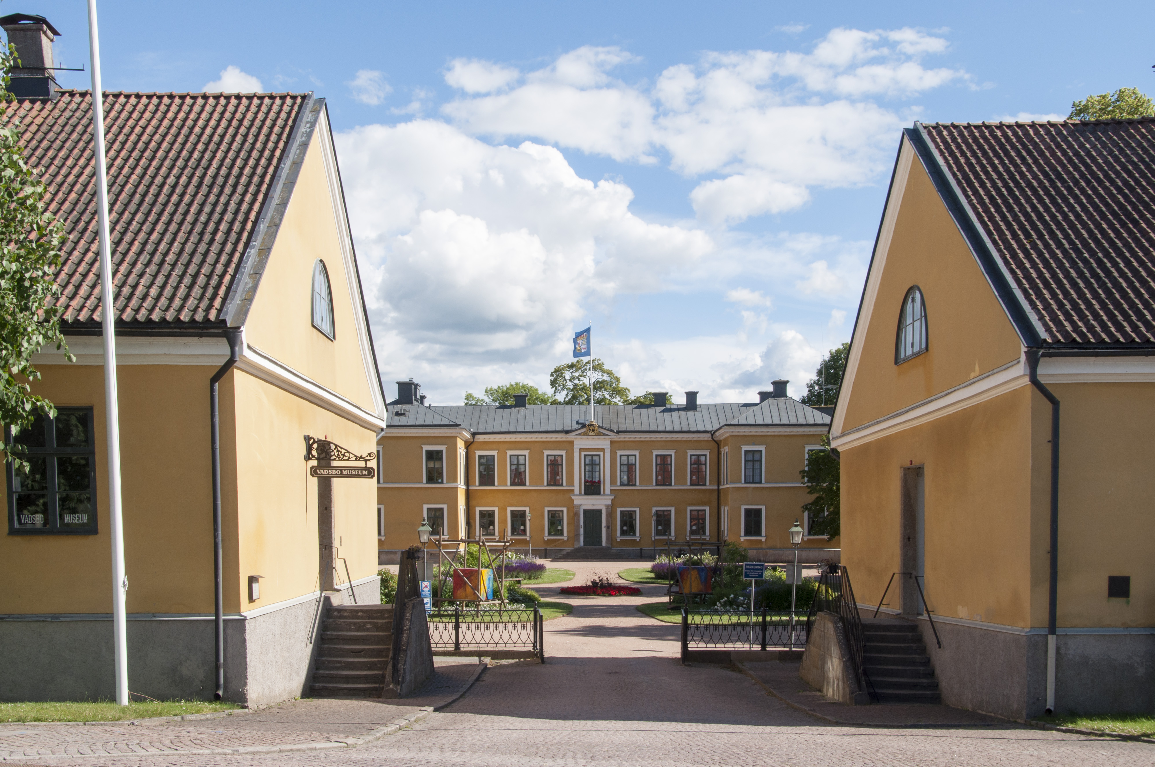 Marieholms slott, Mariestad